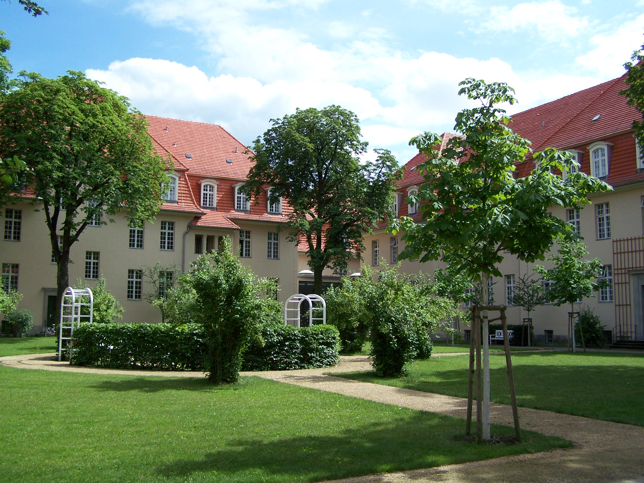 Von den fünf großen Heil- und Pflegeanstalten, die der Berliner Stadtbaurat Ludwig Hoffmann Anfang des 20. Jahrhunderts für Buch entwarf, wird heute noch eines als Klinikcampus genutzt. Mit dem „LudwigPark“ (Foto) und „Allées des Châteaux“ sind dort einzigartige Wohnparks entstanden.